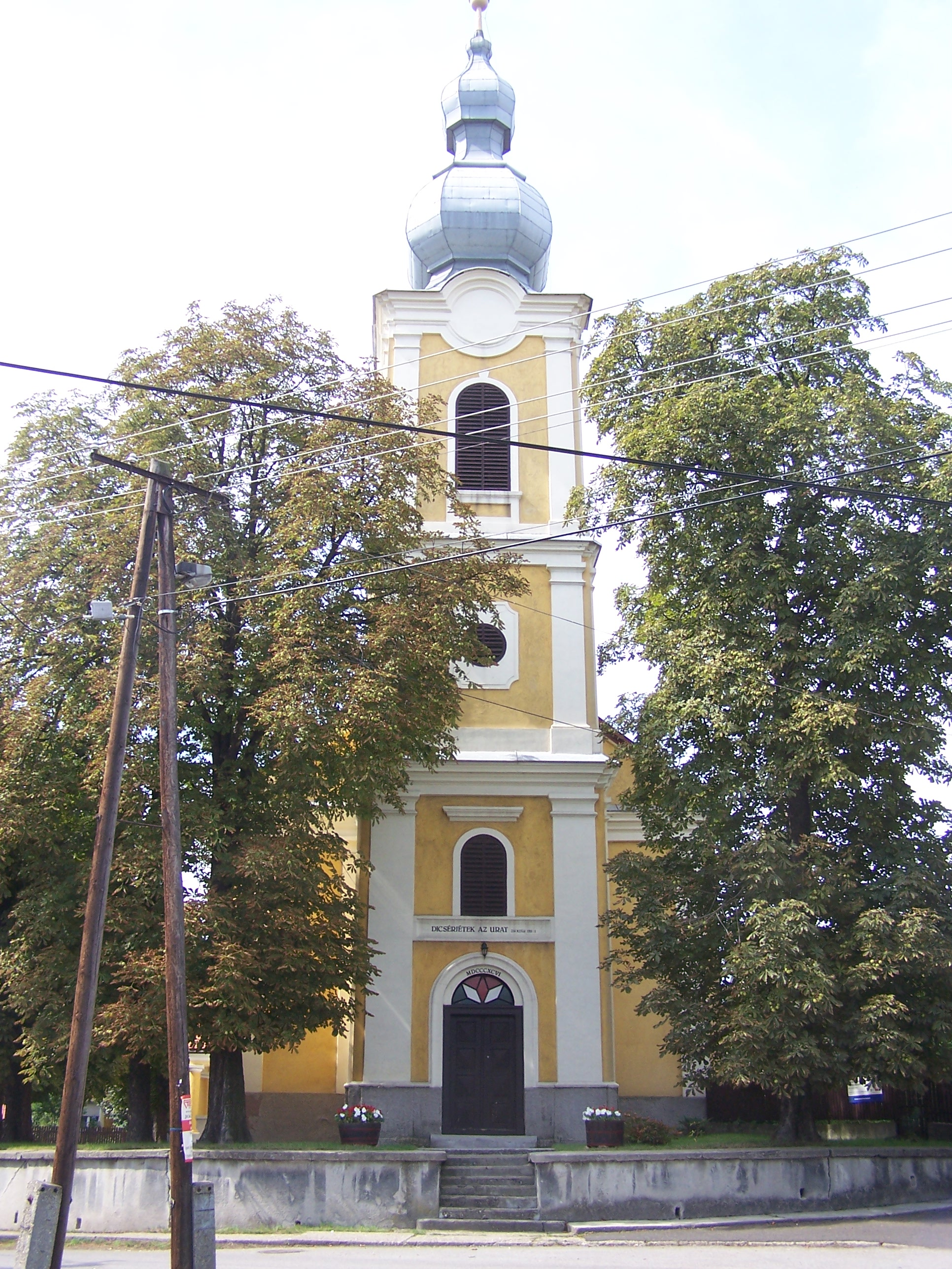 Ref. templom (Sajókápolna, Felszabadítók útja 44.) This is a photo of a monument in Hungary. Identifier: 3065